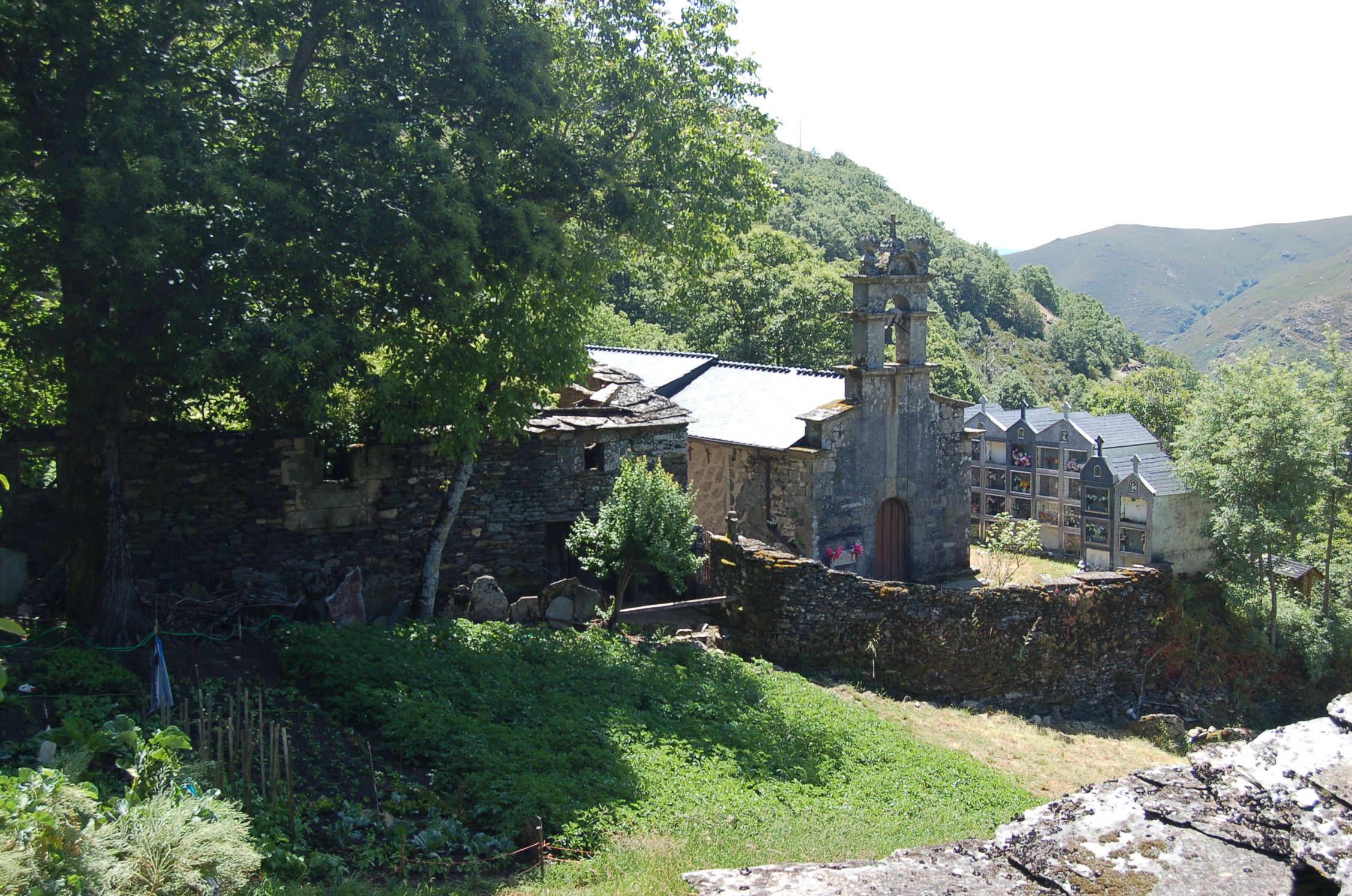 Igrexa de San Mamede de Hedrada (Vilariño de Conso)